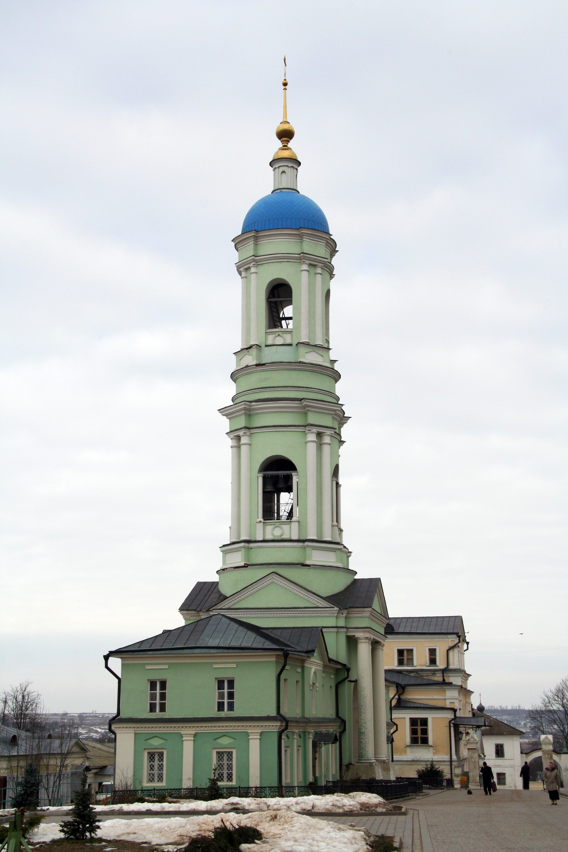 Колокольня в Оптиной пустыни